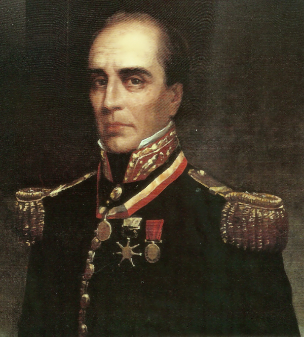 Fragmento del retrato del General en Jefe Rafael Urdaneta por Martín Tovar y Tovar en 1874, óleo sobre tela, localizado en el Salón Azul, del edificio de la Asamblea Nacional de la República Bolivariana de Venezuela. Dicho retrato de Tovar y Tovar fue el modelo para el diseño del billete de 20 Bolívares de fecha de emisión octubre 20, 1987 el cual se emitió con motivo de la celebración de 200 aniversario del natalicio del héroe zuliano.